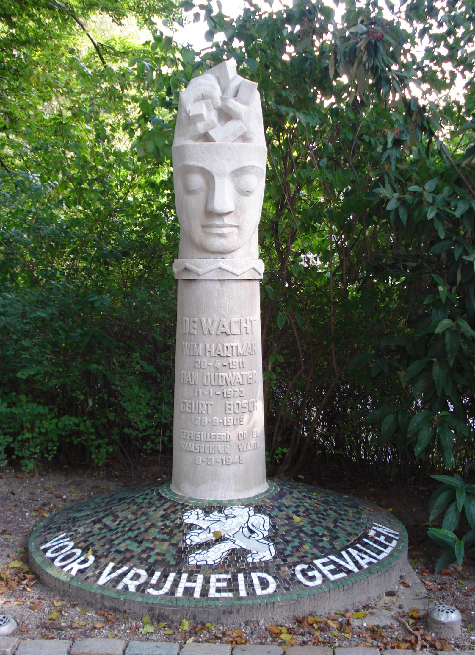 Rotterdam, begraafplaats Crooswijk. Monument "De Wacht" van Louis van Roode. Rotterdam/The Netherlands.